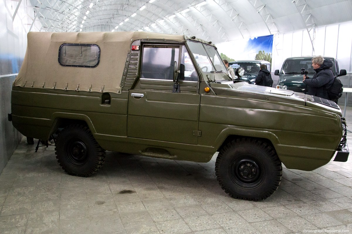 УАЗ-3907 (плавающий). Выставочный павильон-музей УАЗа.